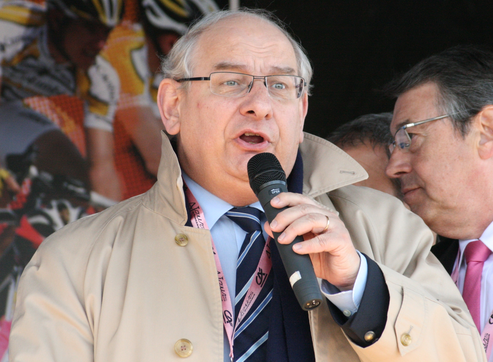 Michel Delebarre lors des Quatre jours de Dunkerque 2010